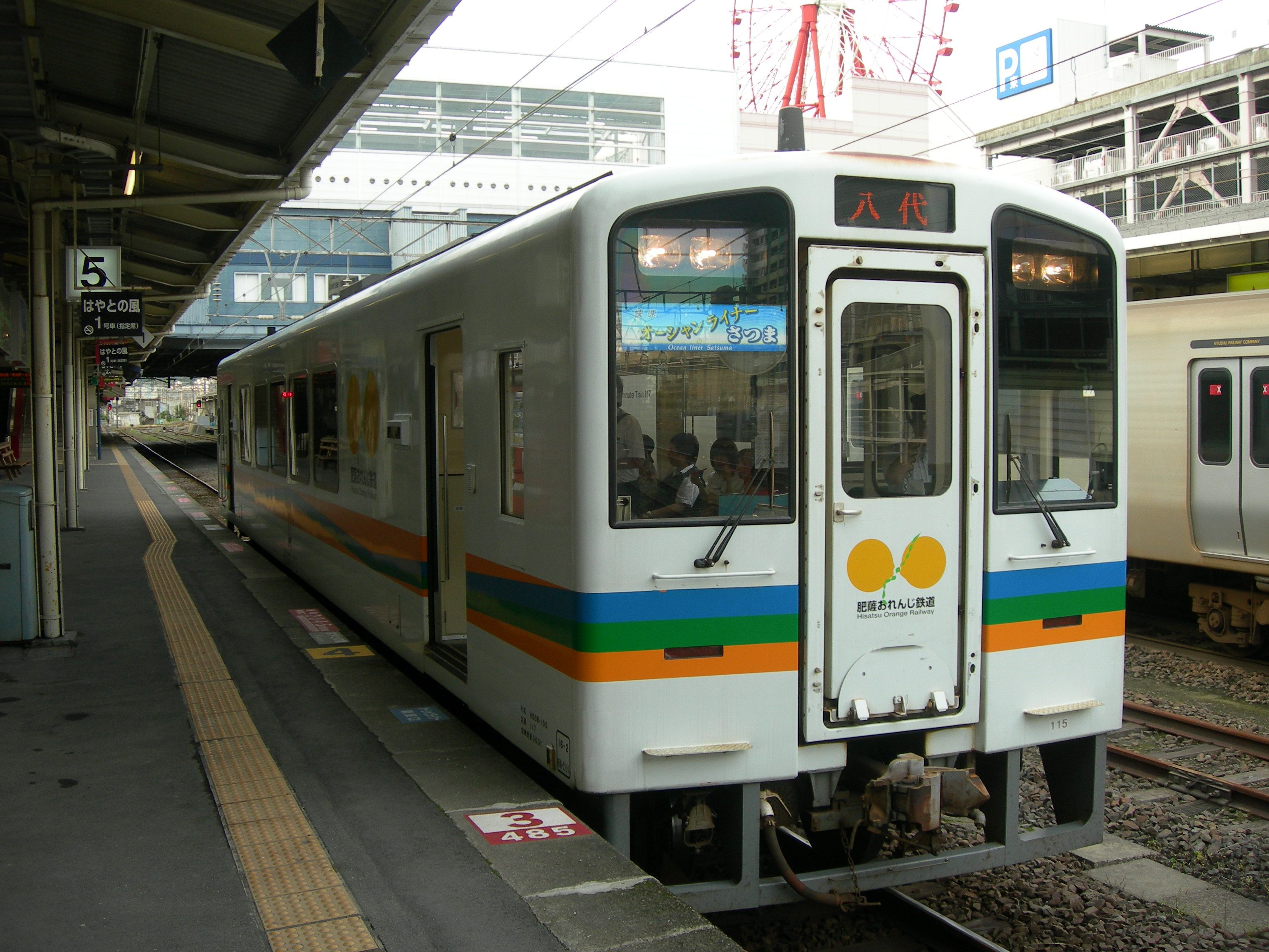 肥薩おれんじ鉄道HSOR-100形気動車 鹿児島中央駅で撮影